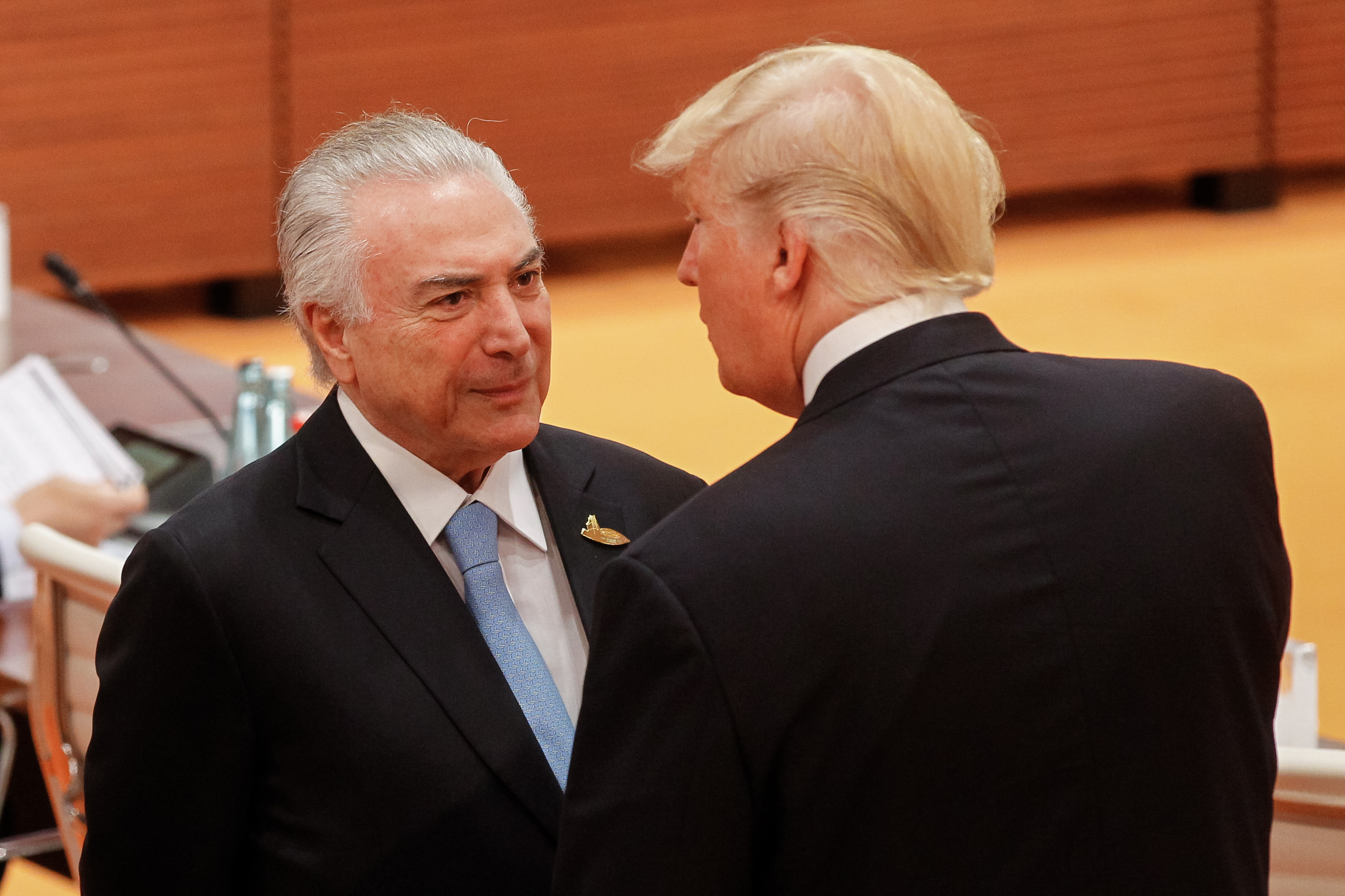 (Hamburgo - Alemanha, 08/07/2017) Terceira Sessão de Trabalho. Foto: Beto Barata/PR